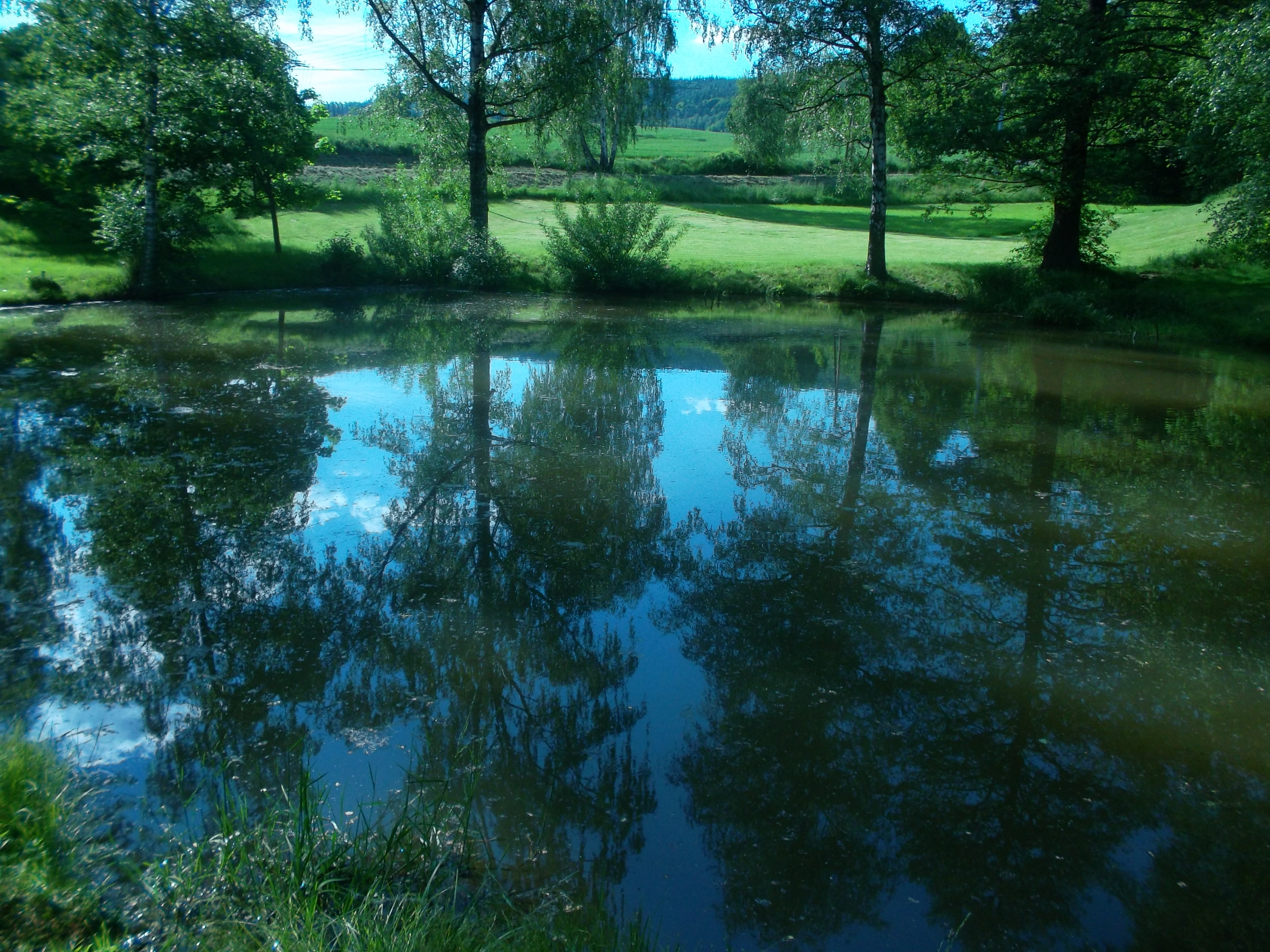 Ansicht des Teiches neben der Sonnenberger Straße